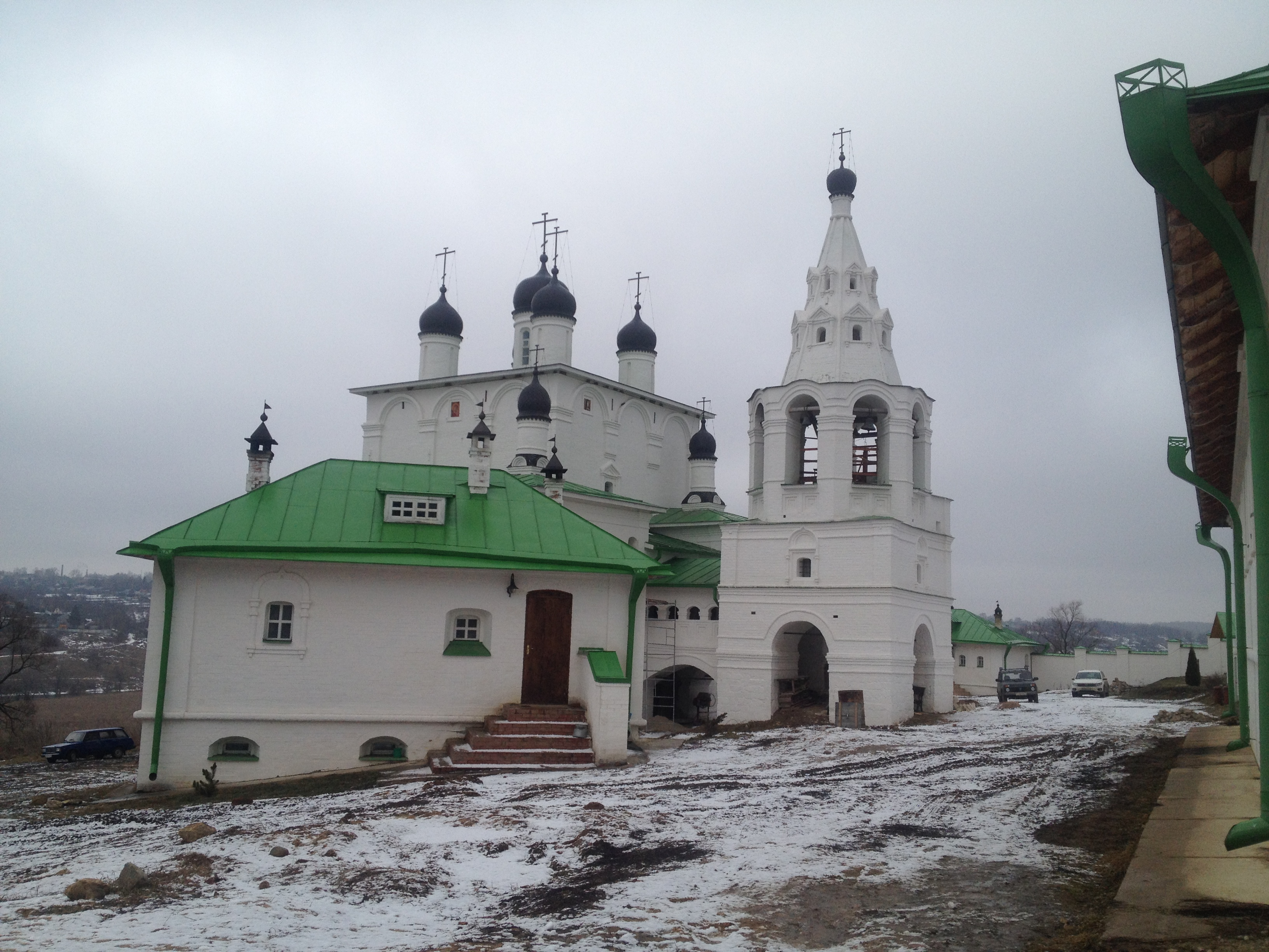 Монастырь Богородице-Рождественский Анастасов (Тульская область, Суворов, село Анастасово)